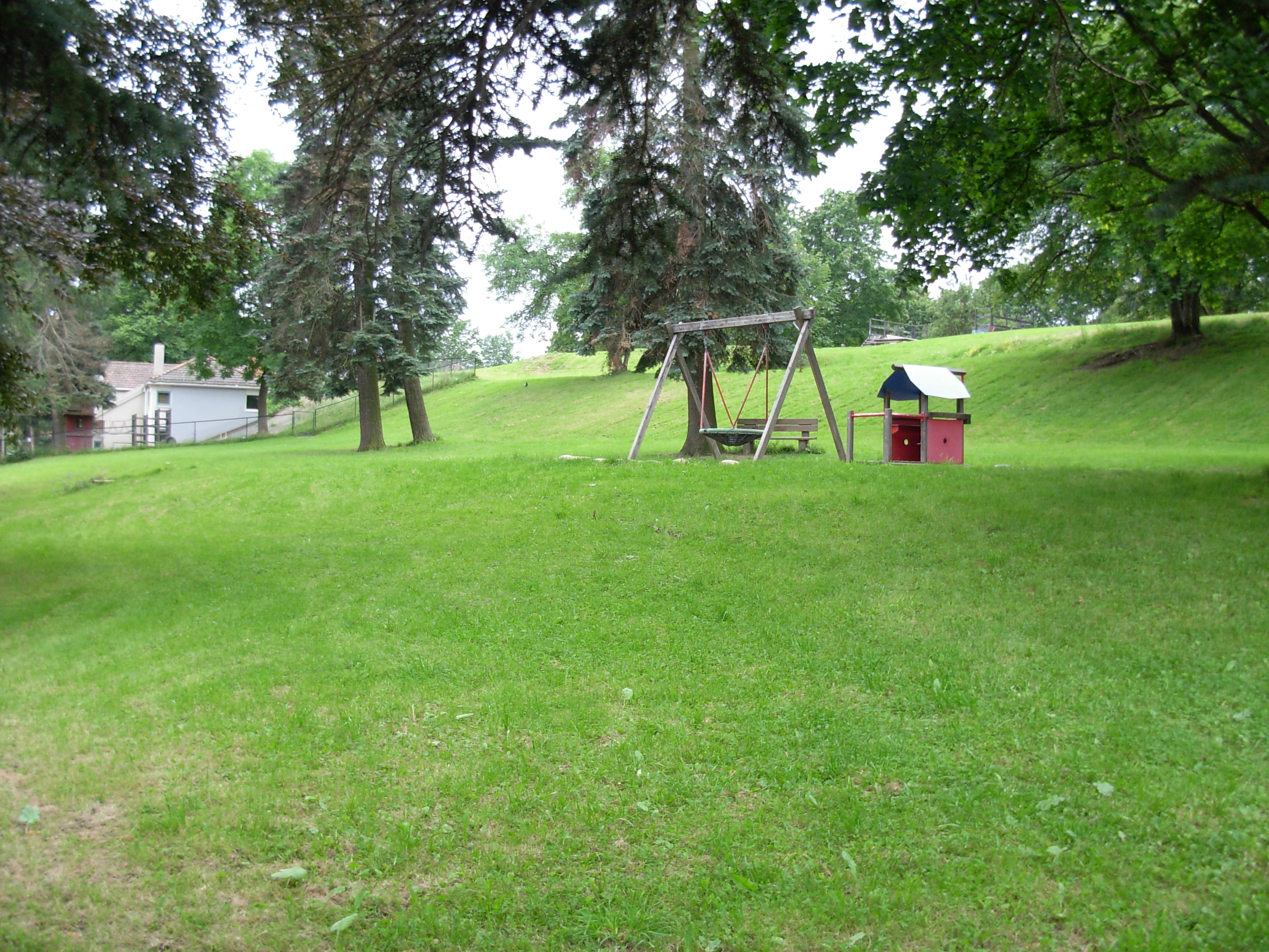 Harald Hals' park, Ullevål, sett fra nordøstlige hjørne